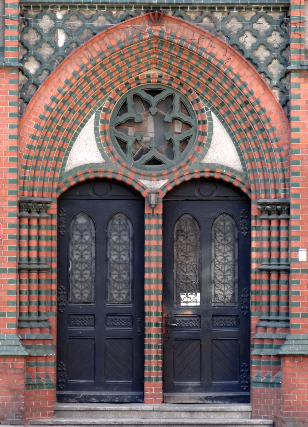 Budynek Poczty Głównej w Bydgoszczy przy ul. Jagiellońskiej (zbud. 1883 skrzydło płd, 1899 skrzydło płn)